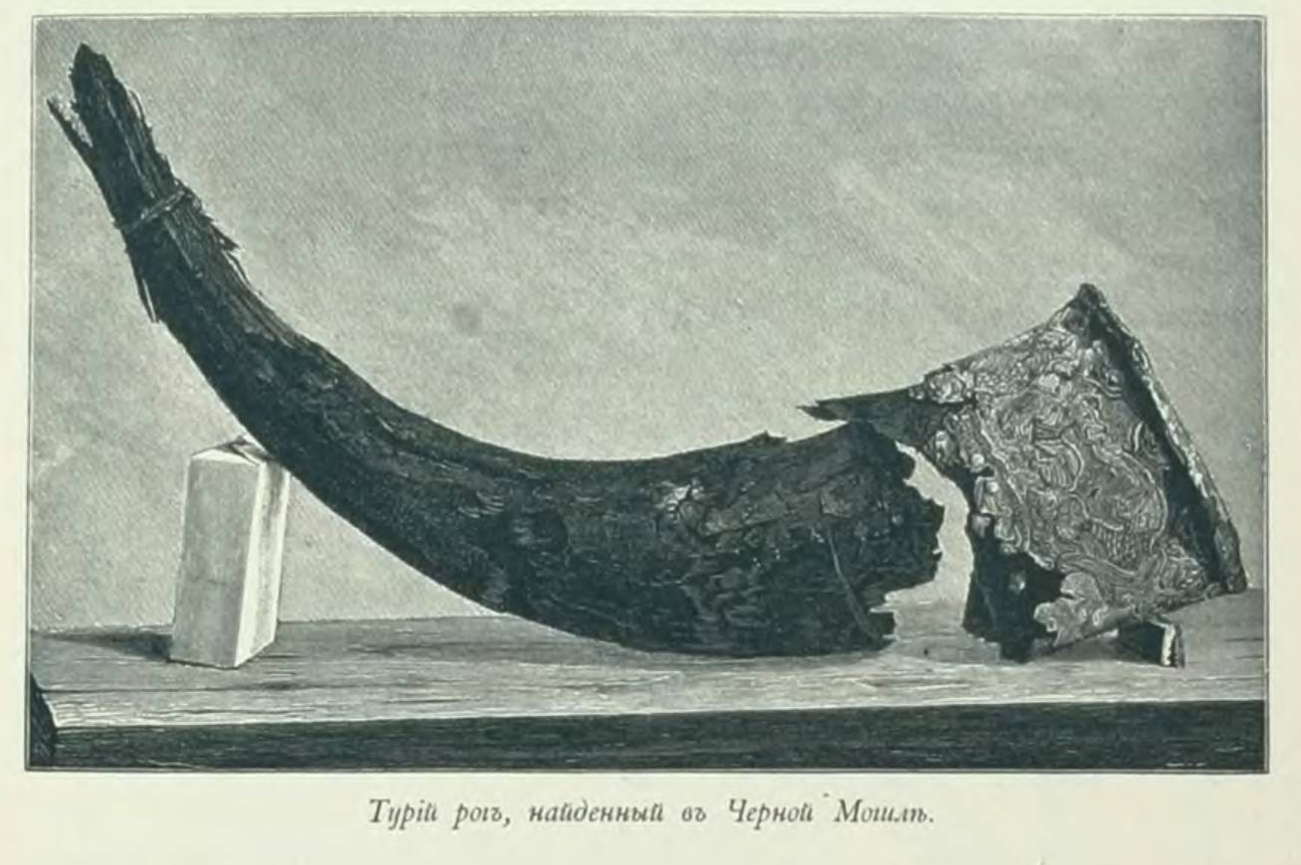 Великокняжеская, царская и императорская охота на Руси